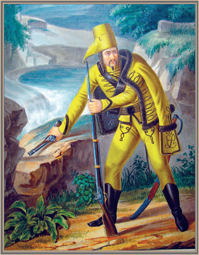 Гусар желтого полка в 1760 и 1761 годах.[сопровождающий текст в "Историческом описании..."]